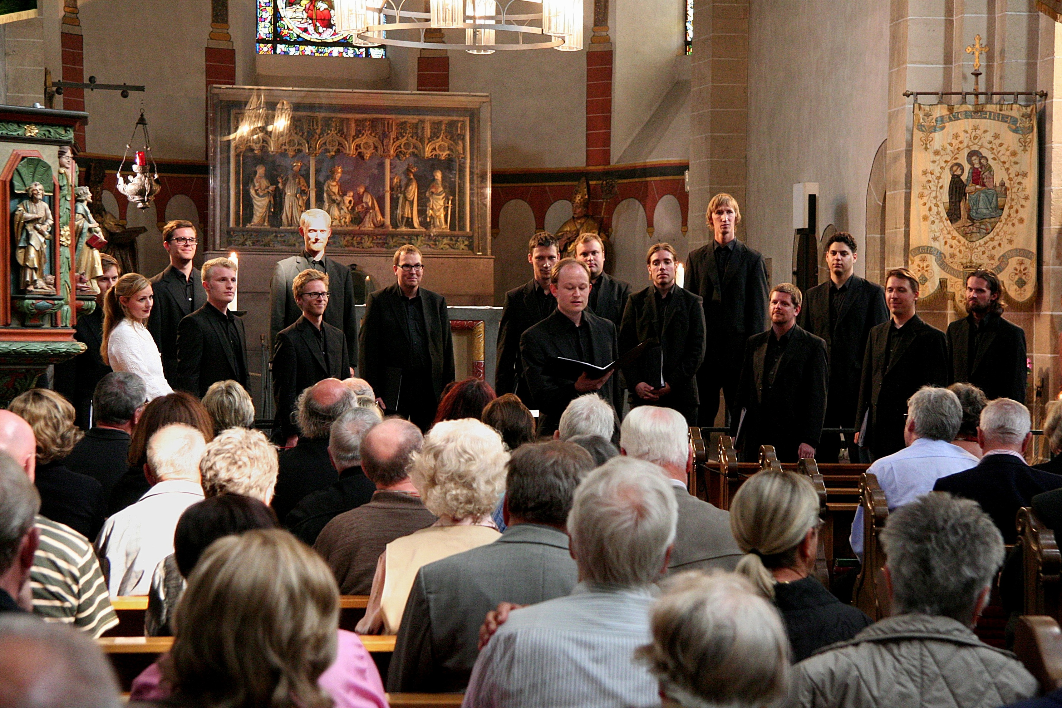 Konzert des schwedischen Kammerchors Swanholm Singers in der St.-Castor-Kirche, Treis-Karden; Leitung: Sofia Söderberg Eberhard (links), Solist: Johannes Midgren